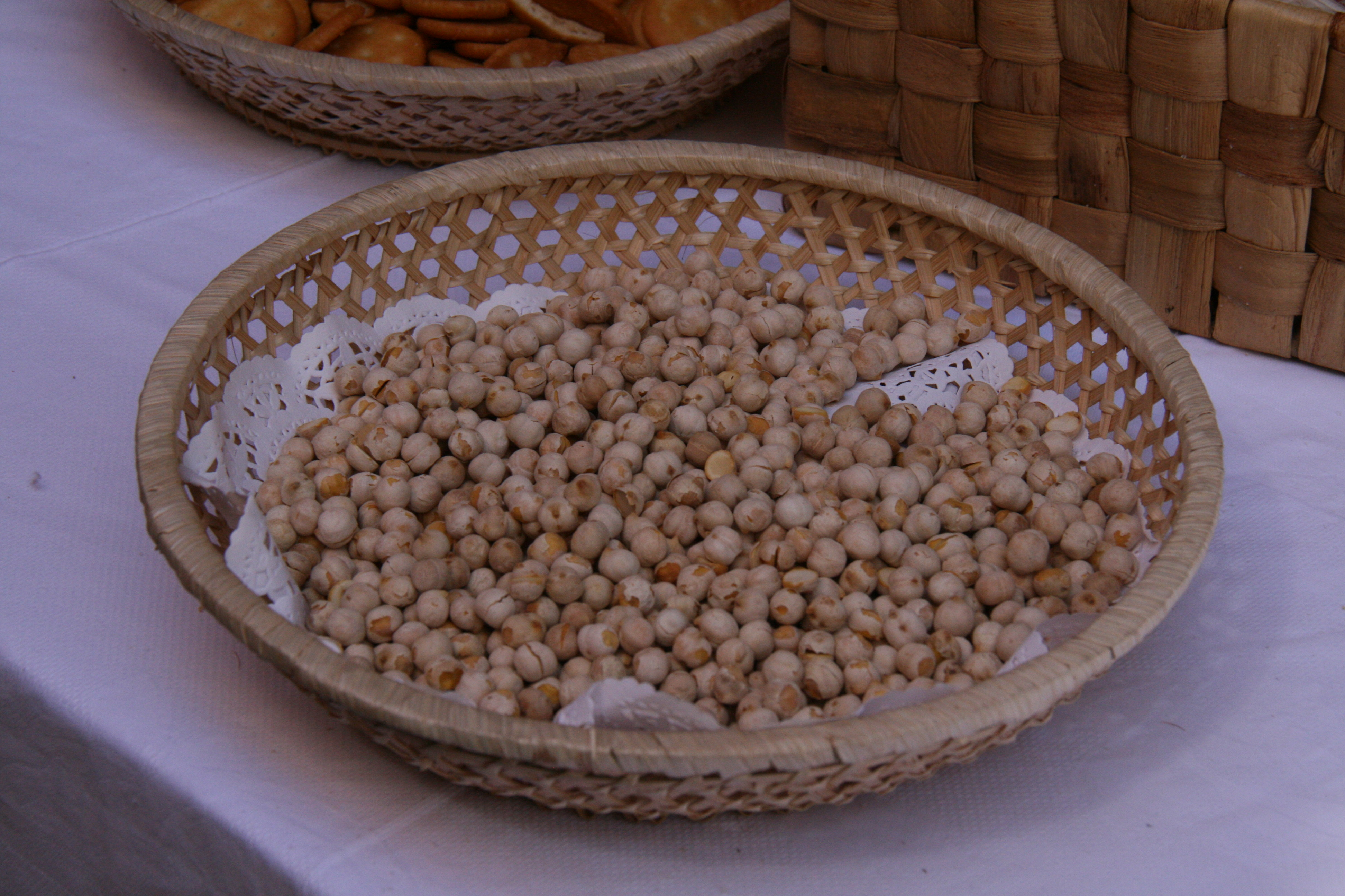 Cesta de Torraos